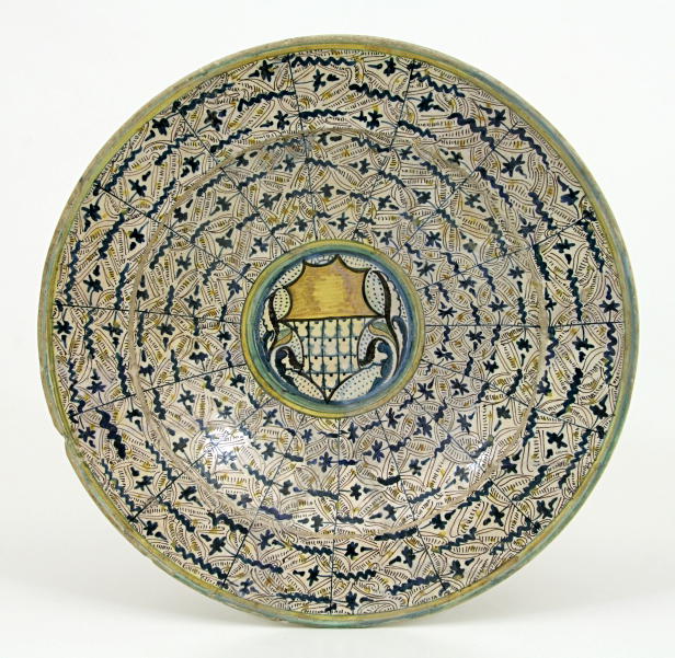 Piatto di Montelupo decorato al centro con stemma Bonciani e decorazione "Santa Fina". Fine del XV secolo